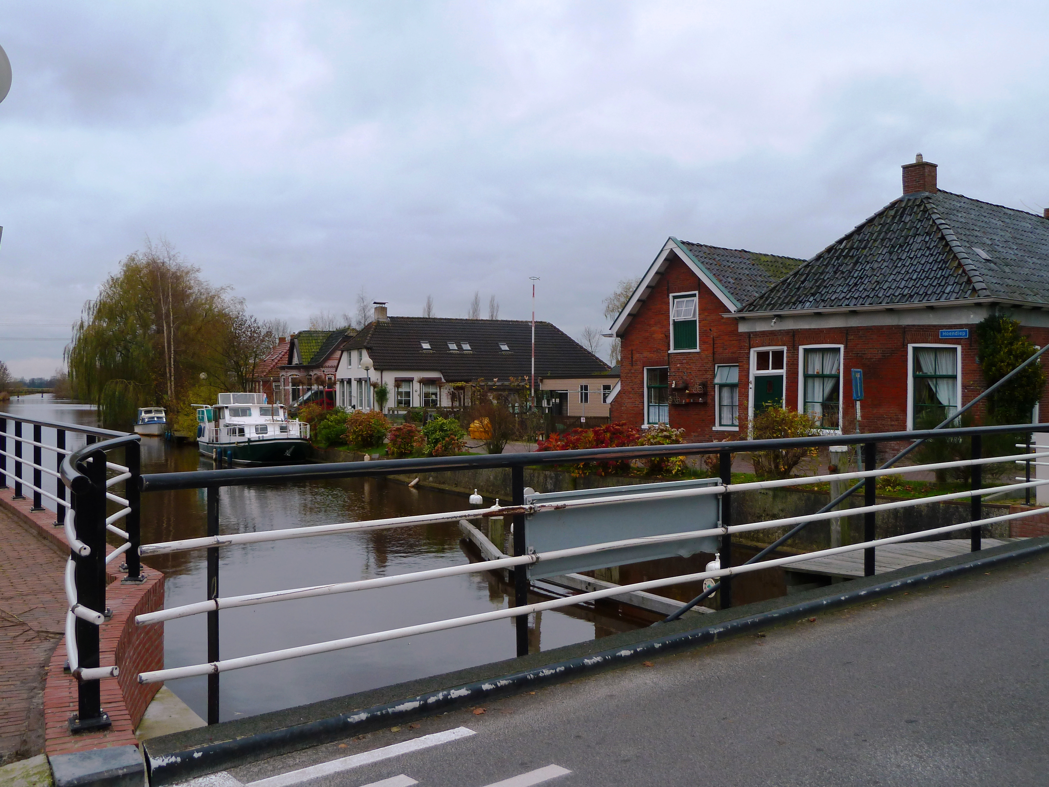 Gezicht vanaf de draaibrug in het dorp Enumatil naar links.